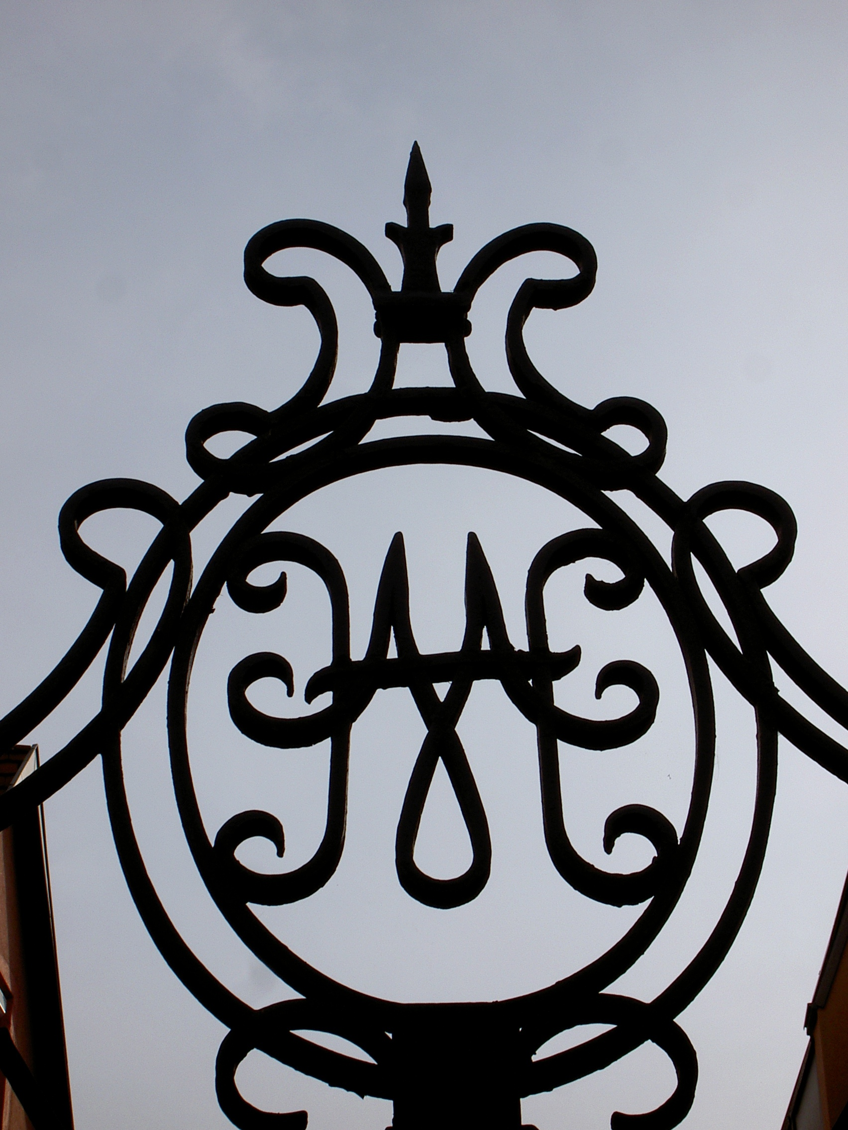 Vue du TGI de Saverne